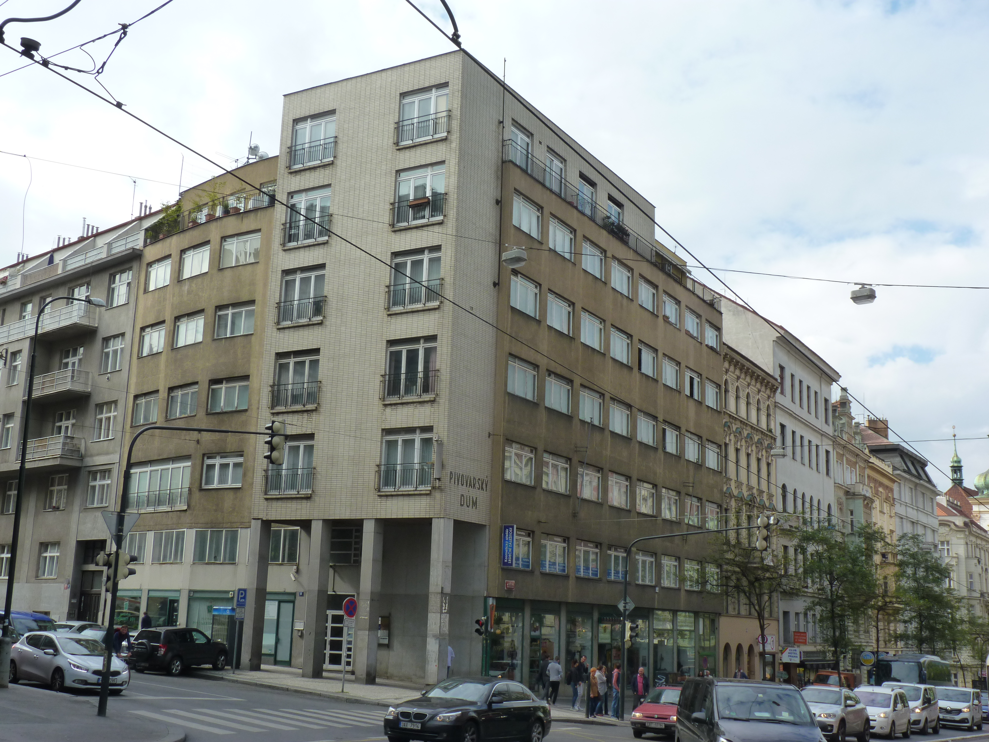 Sídlo Výzkumného ústavu pivovarského a sladařského v Praze